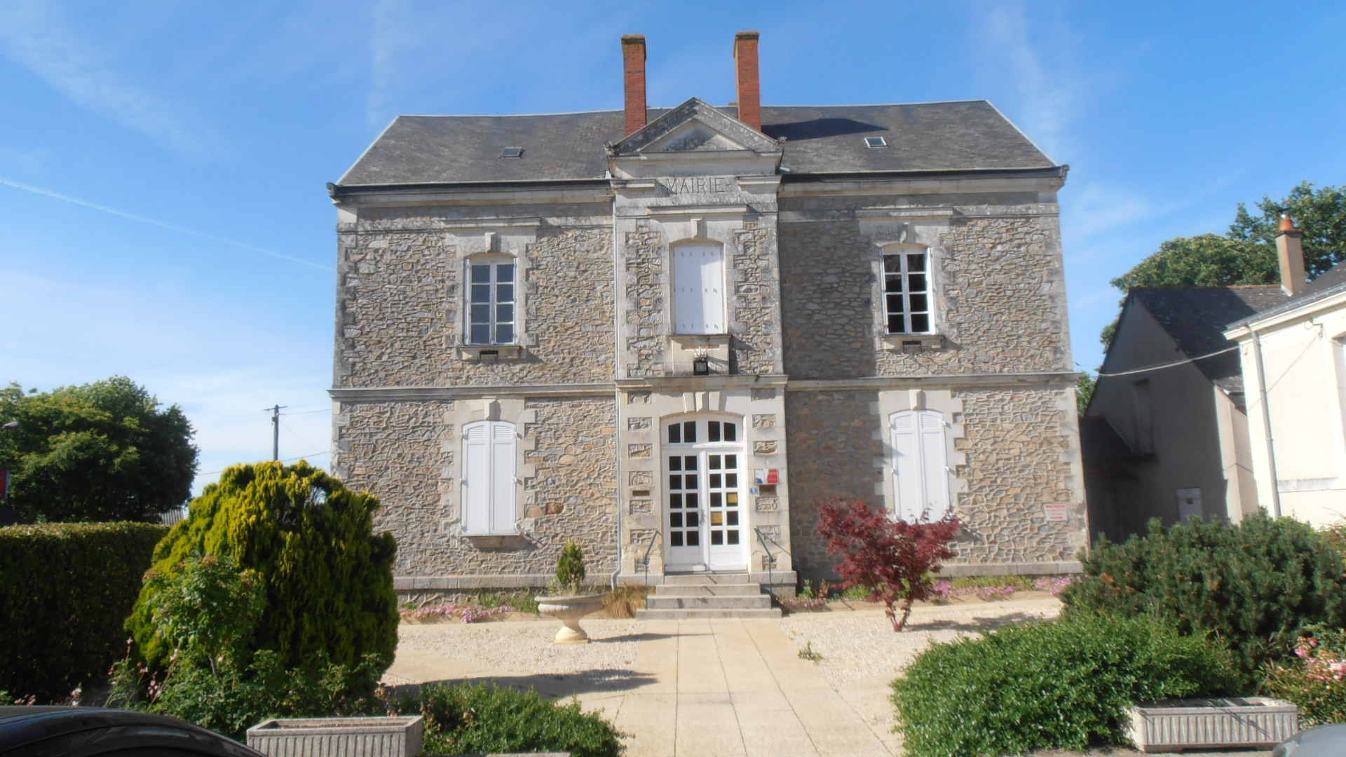 La mairie de la commune de Saint-Augustin-des-Bois (Maine-et-Loire, France).